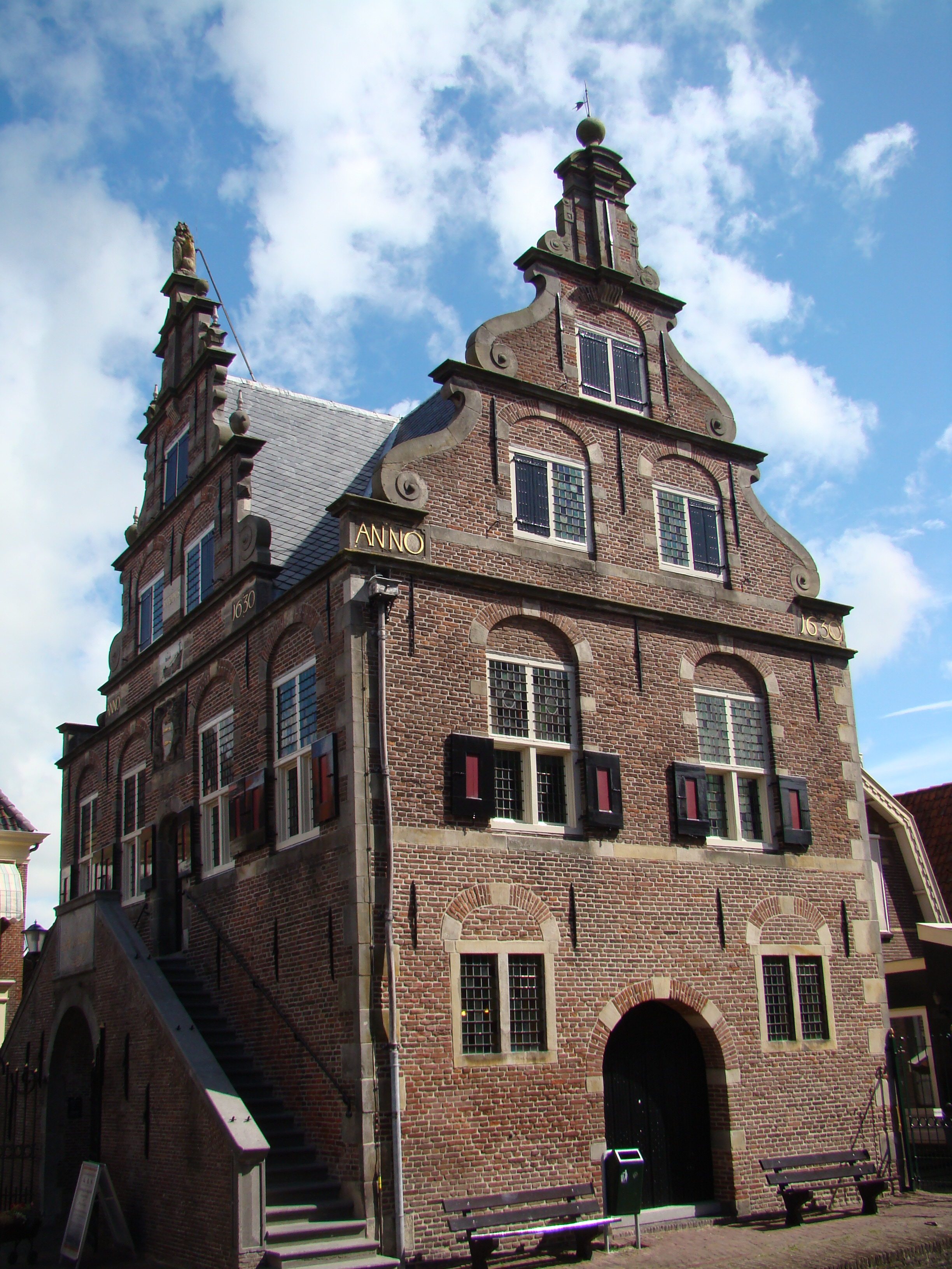 Rijksmonumenten in De Rijp, Monumental buildings in De Rijp, Netherlands